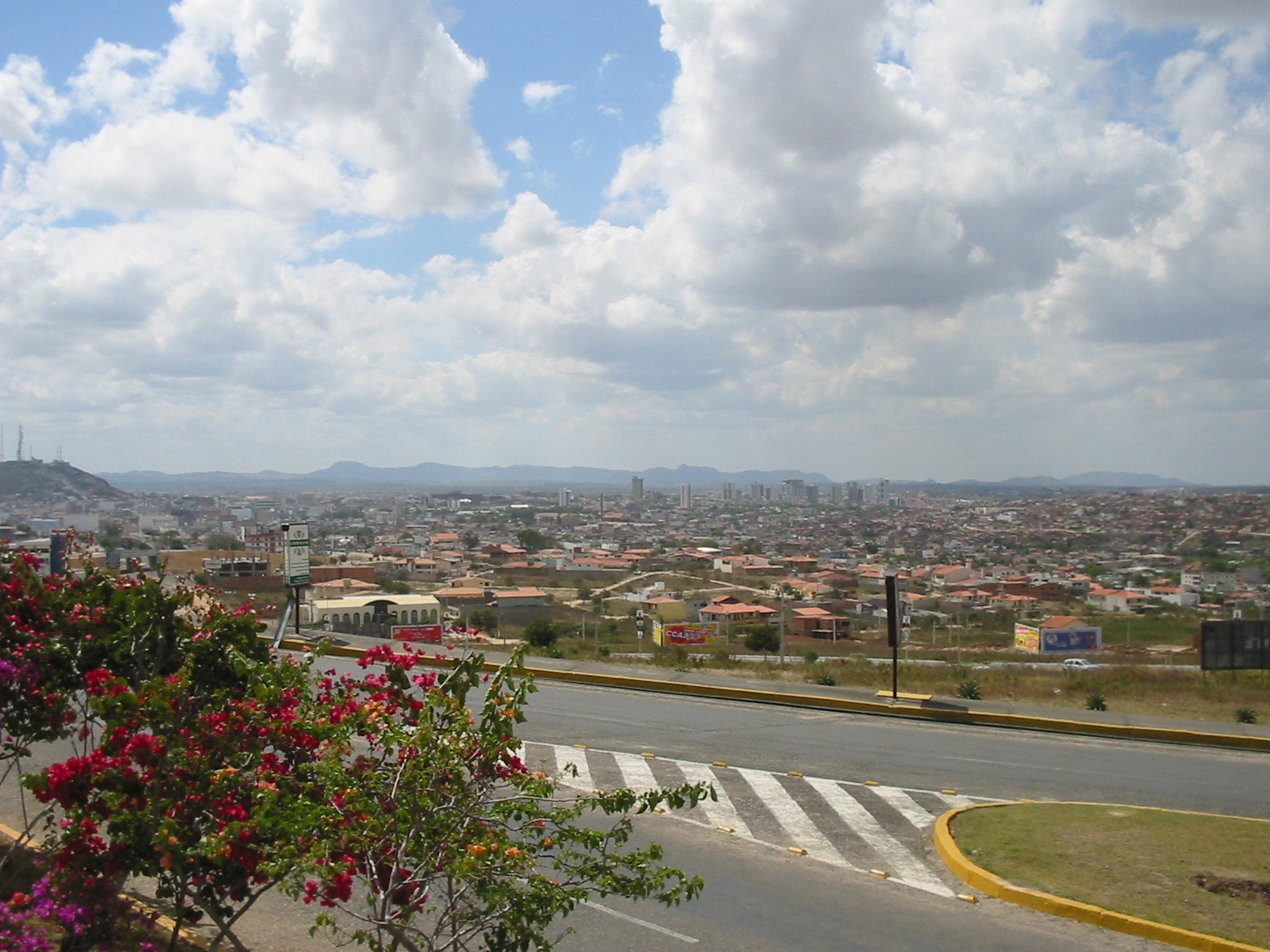 Vista a partir do estacionamento do Shopping Caruaru - Caruaru, Pernambuco, Brasil